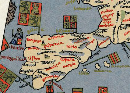 Península Ibérica nunha edición facsímile do Erdapfel, o globo terrestre máis antigo conservado.